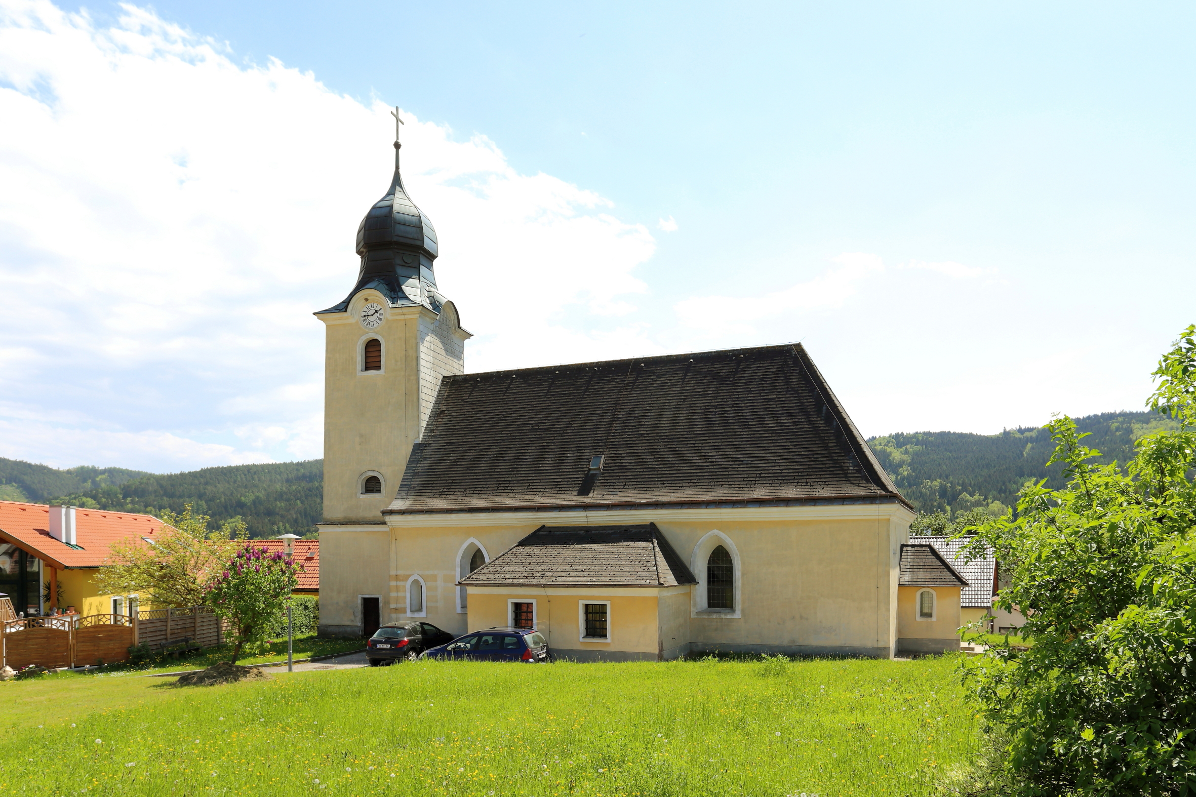 Katholische Filialkirche hll. Petrus und Paulusin in Würnsdorf, ein Ortsteil der niederösterreichischen Marktgemeinde Pöggstall.